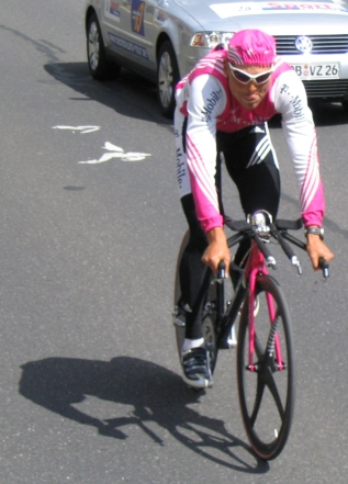 Jan Ullrich vor dem Zeitfahren bei der Deutschlandtour 2004 in Karlsruhe